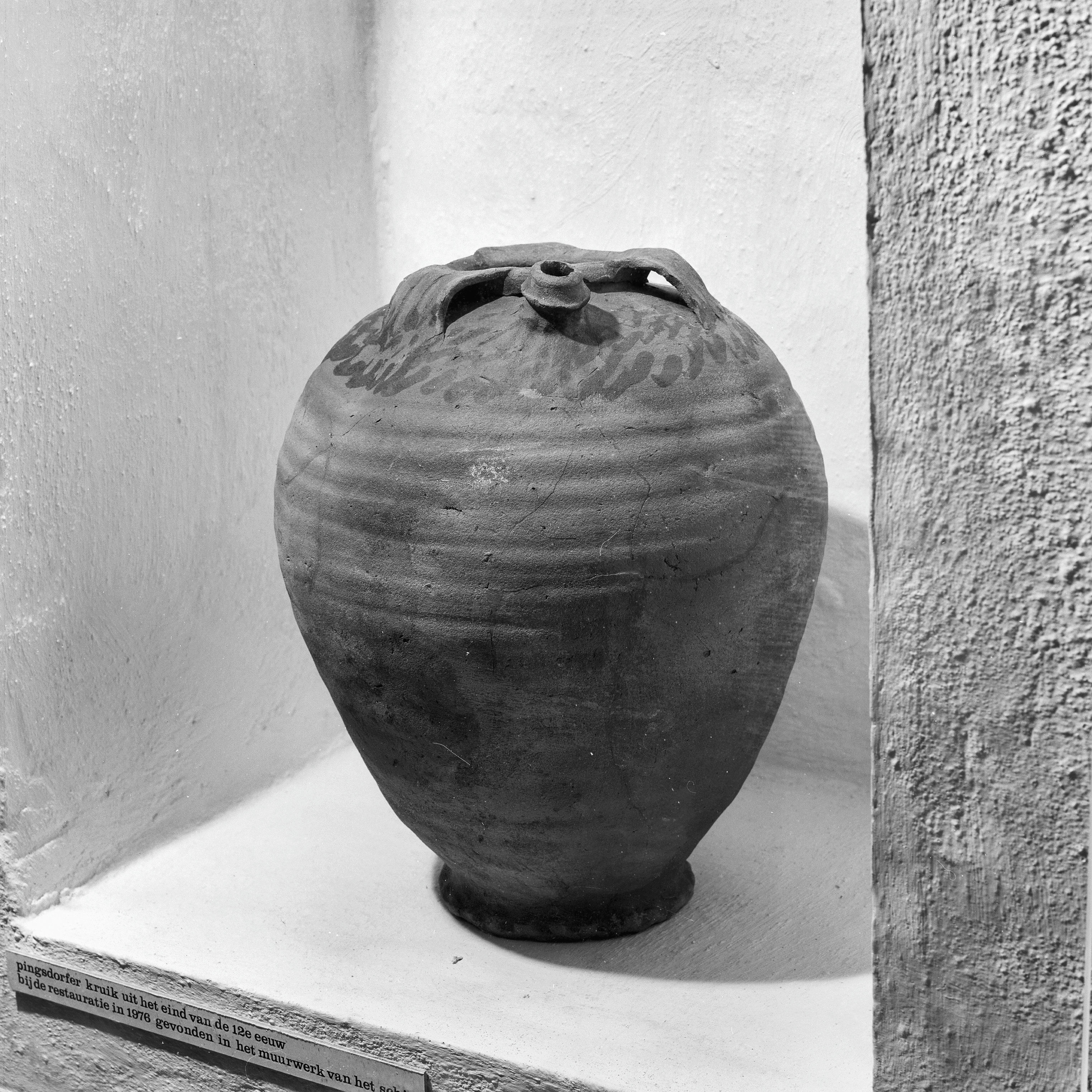 N.H.Kerk: Pingsdorferkruik, eind 12e eeuw